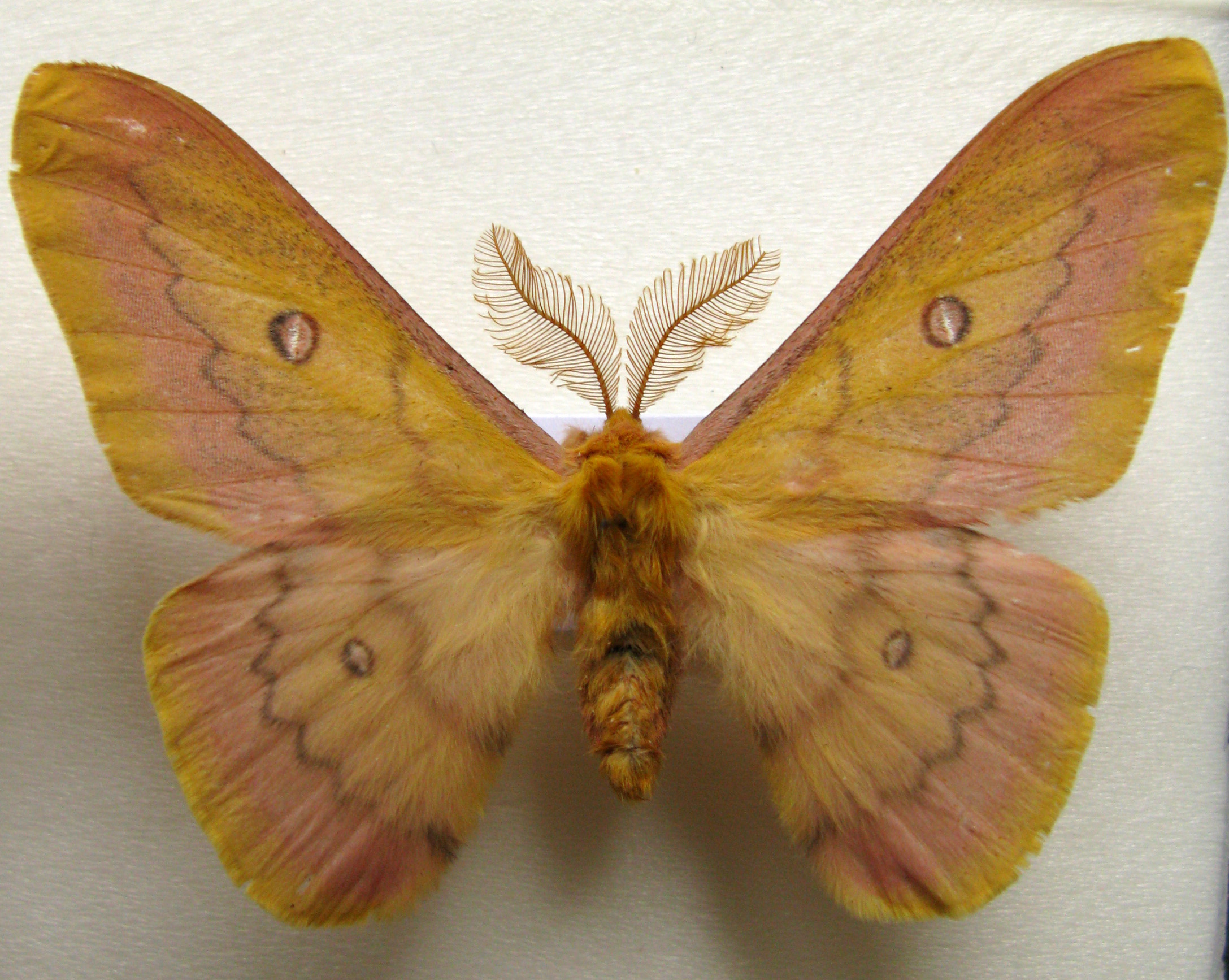 Павлиноглазка подслеповатая (Perisomena caecigena) самец